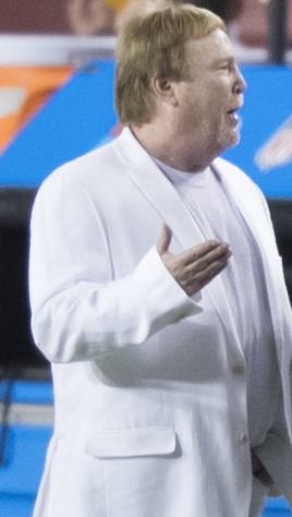 Raiders at Redskins 9/24/17